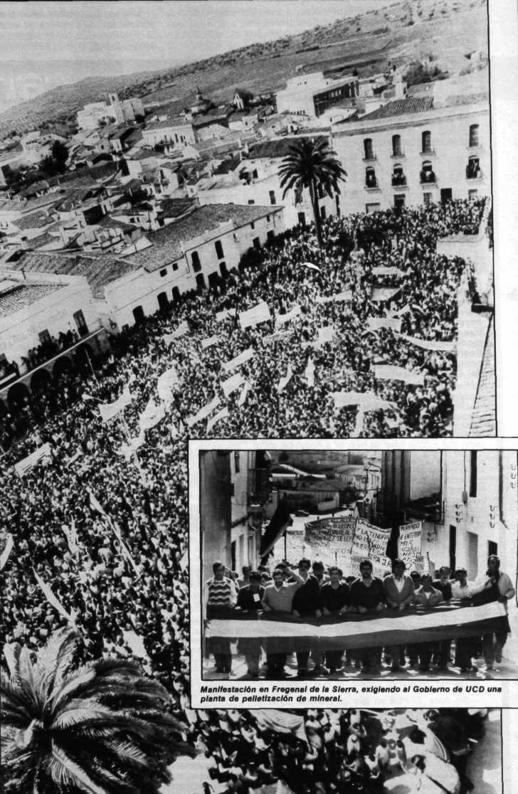 Manifestación en el Paseo de la Constitución por Mundo Obrero